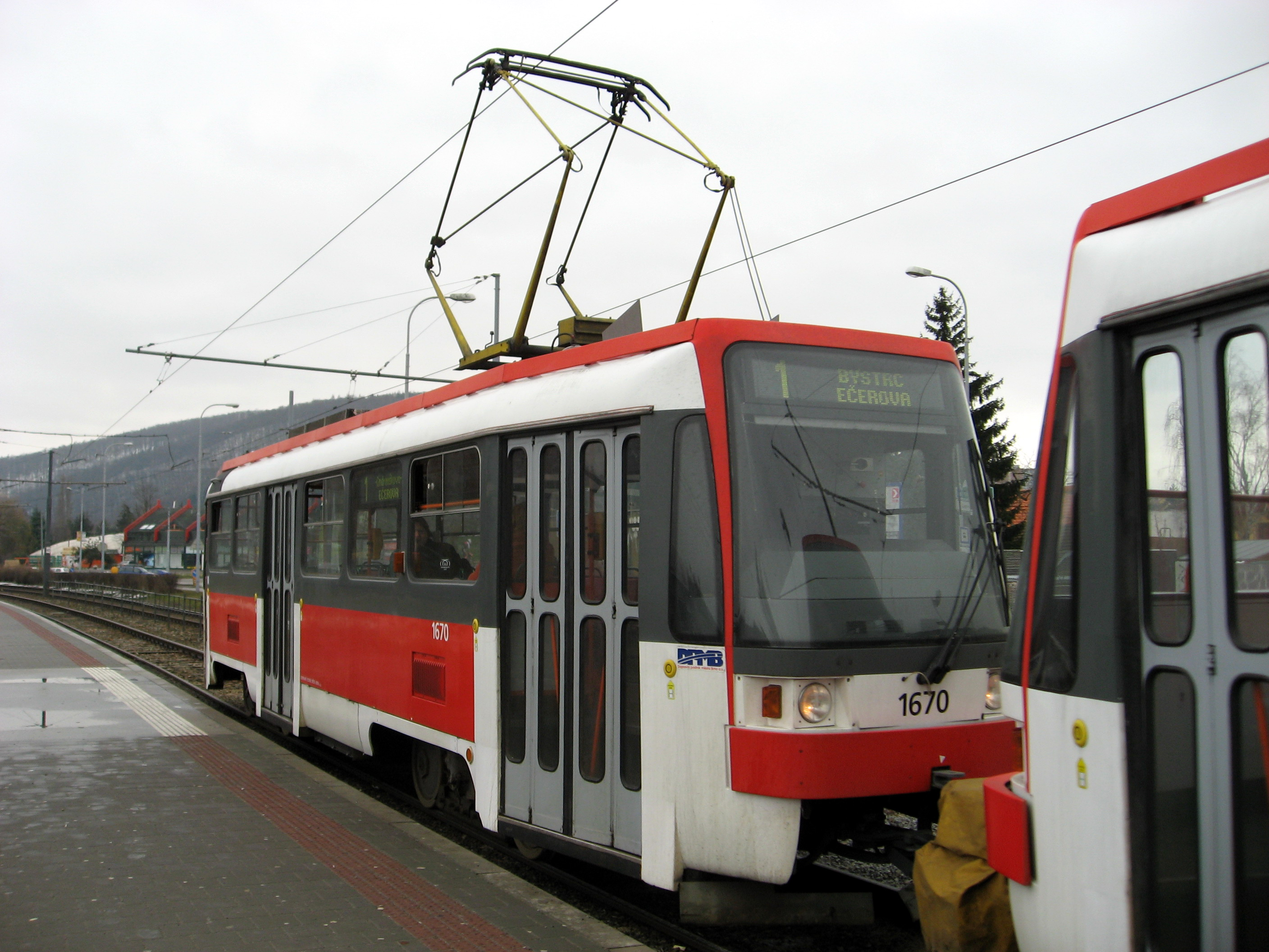 Tatra T3RF u Zoologické zahrady